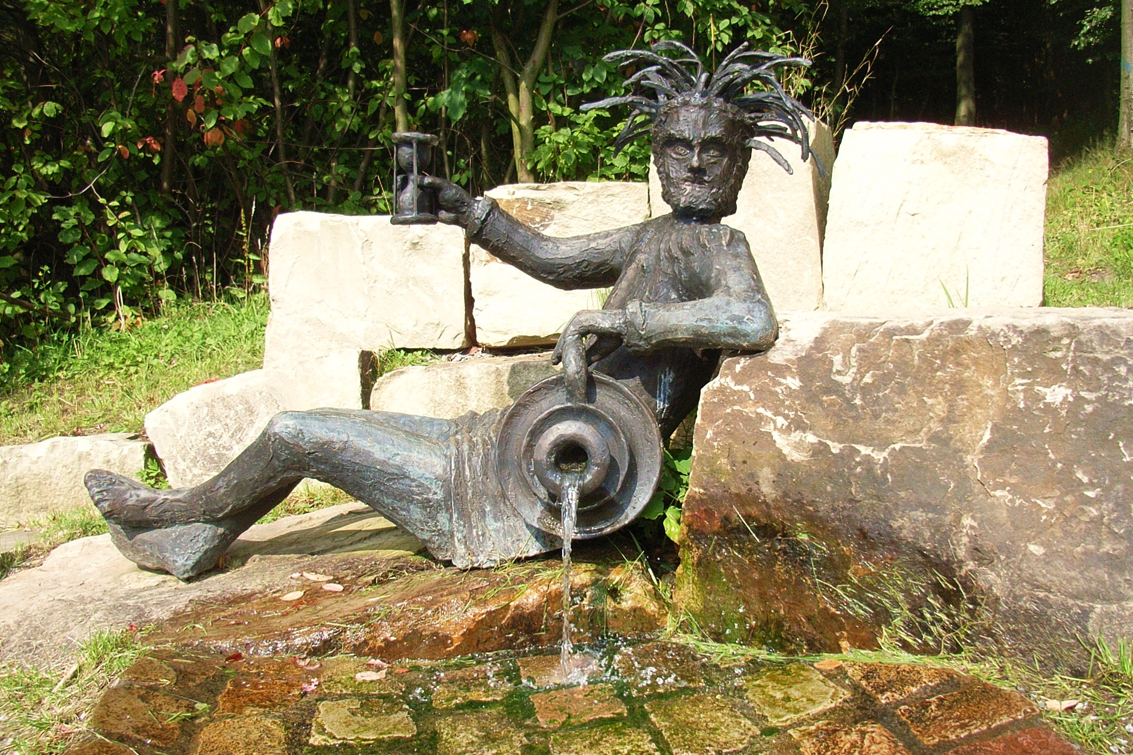 Die Bolerbornquelle nach ihrer Neugestaltung.